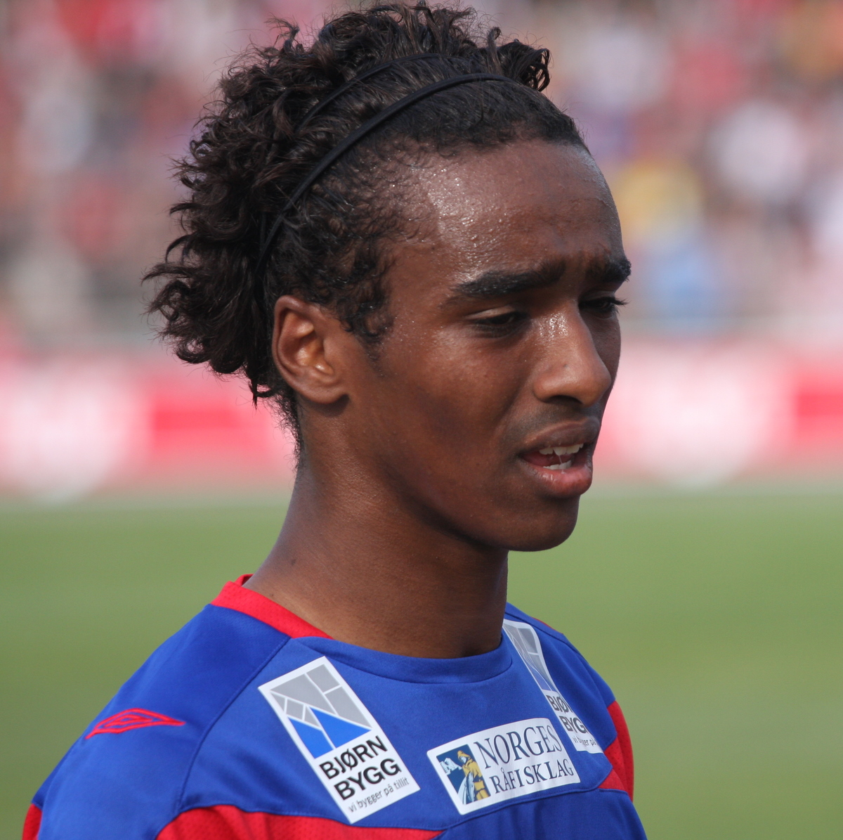 Mohammed Ahamed